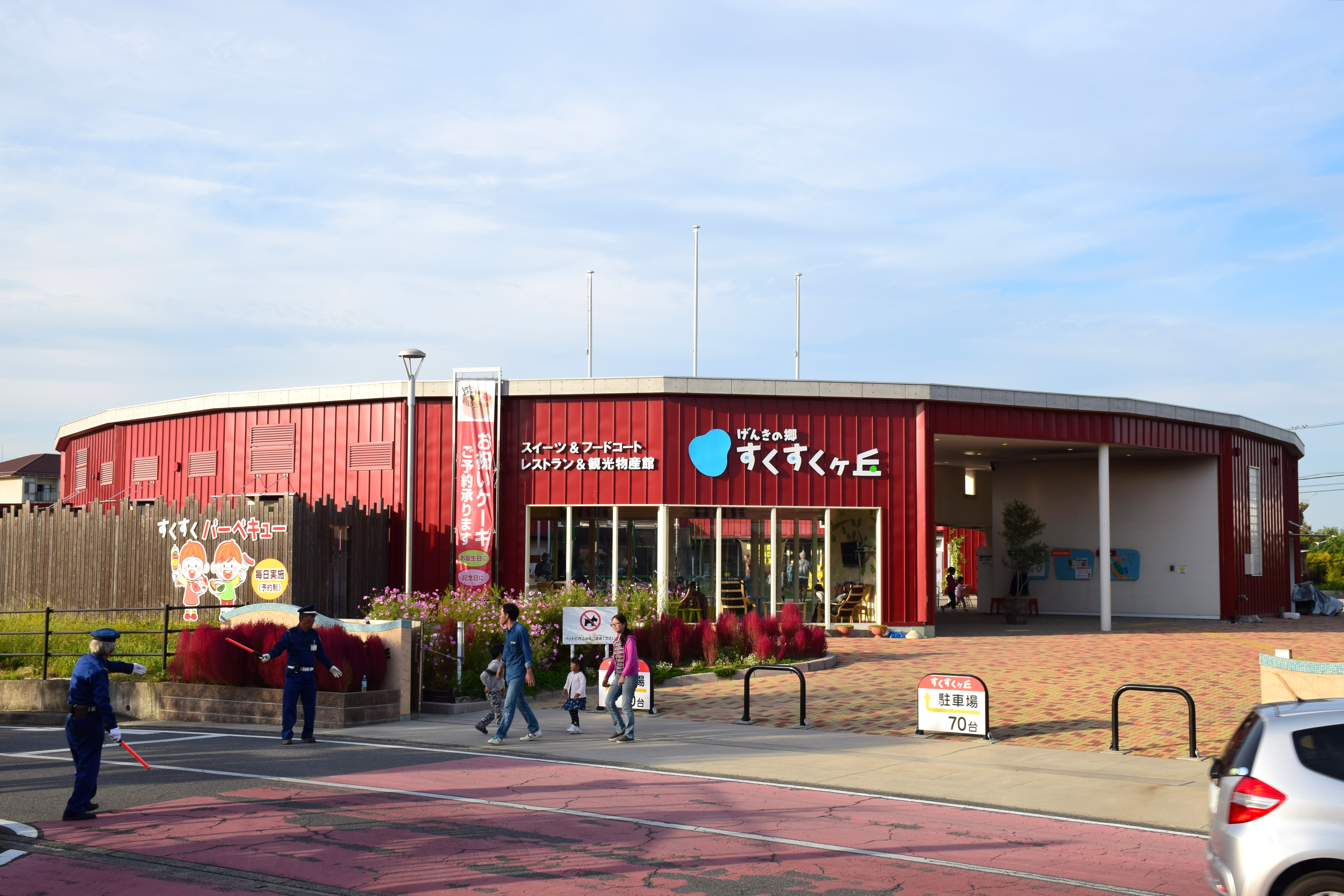 JAあぐりタウンげんきの郷・知多半島物産館「すくすくヶ丘」（愛知県大府市）